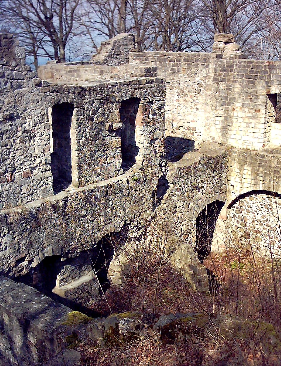 Burg Bramberg: Inneres des Hauptgebäudes mit dem Torturm